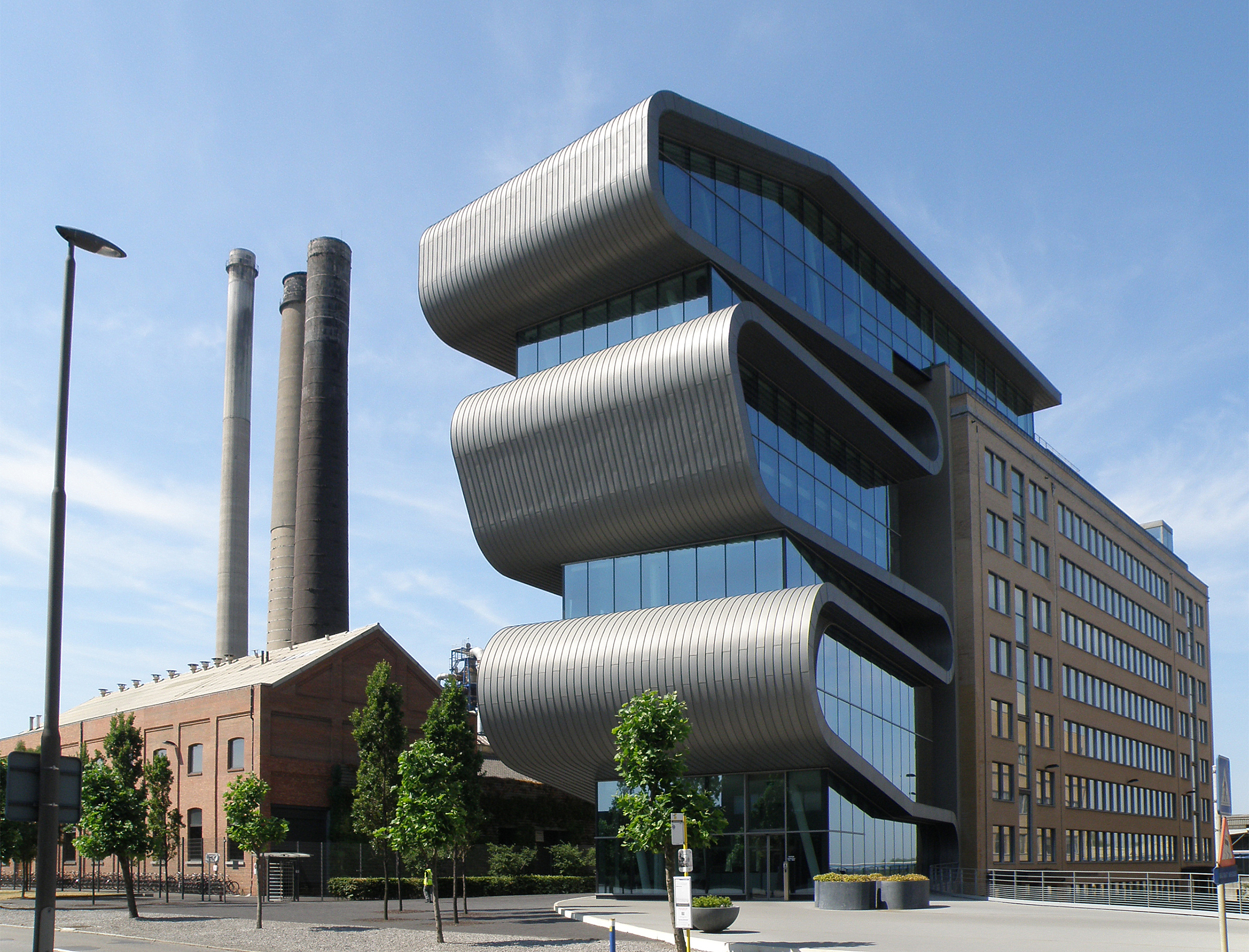 Antwerpen, district Hoboken (België). Umicore-fabrieken, Adolf Greinerstraat.